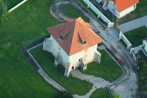 Szabadbattyán, Hungary, aerialphotography